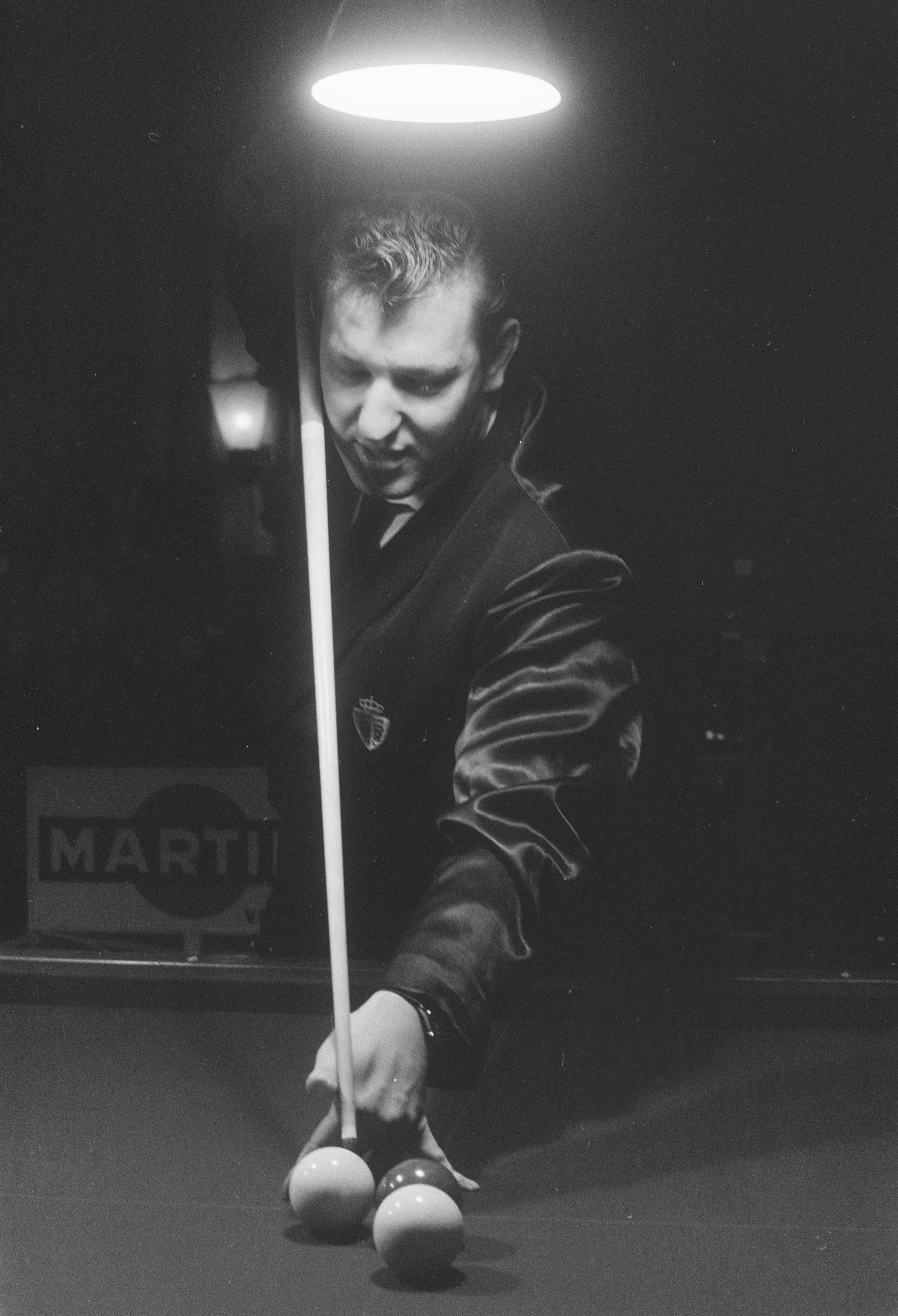 Collectie / Archief : Fotocollectie Anefo Reportage / Serie : [ onbekend ] Beschrijving : Europese Biljartkampioenschappen in Den Helder . De Belg Ceulemans aan stoot Datum : 28 februari 1963 Locatie : Den Helder Trefwoorden : BILJARTEN, kampioenschappen Persoonsnaam : Ceulemans Fotograaf : Gelderen, Hugo van / Anefo Auteursrechthebbende : Nationaal Archief Materiaalsoort : Negatief (zwart/wit) Nummer archiefinventaris : bekijk toegang 2.24.01.05 Bestanddeelnummer : 914-8816